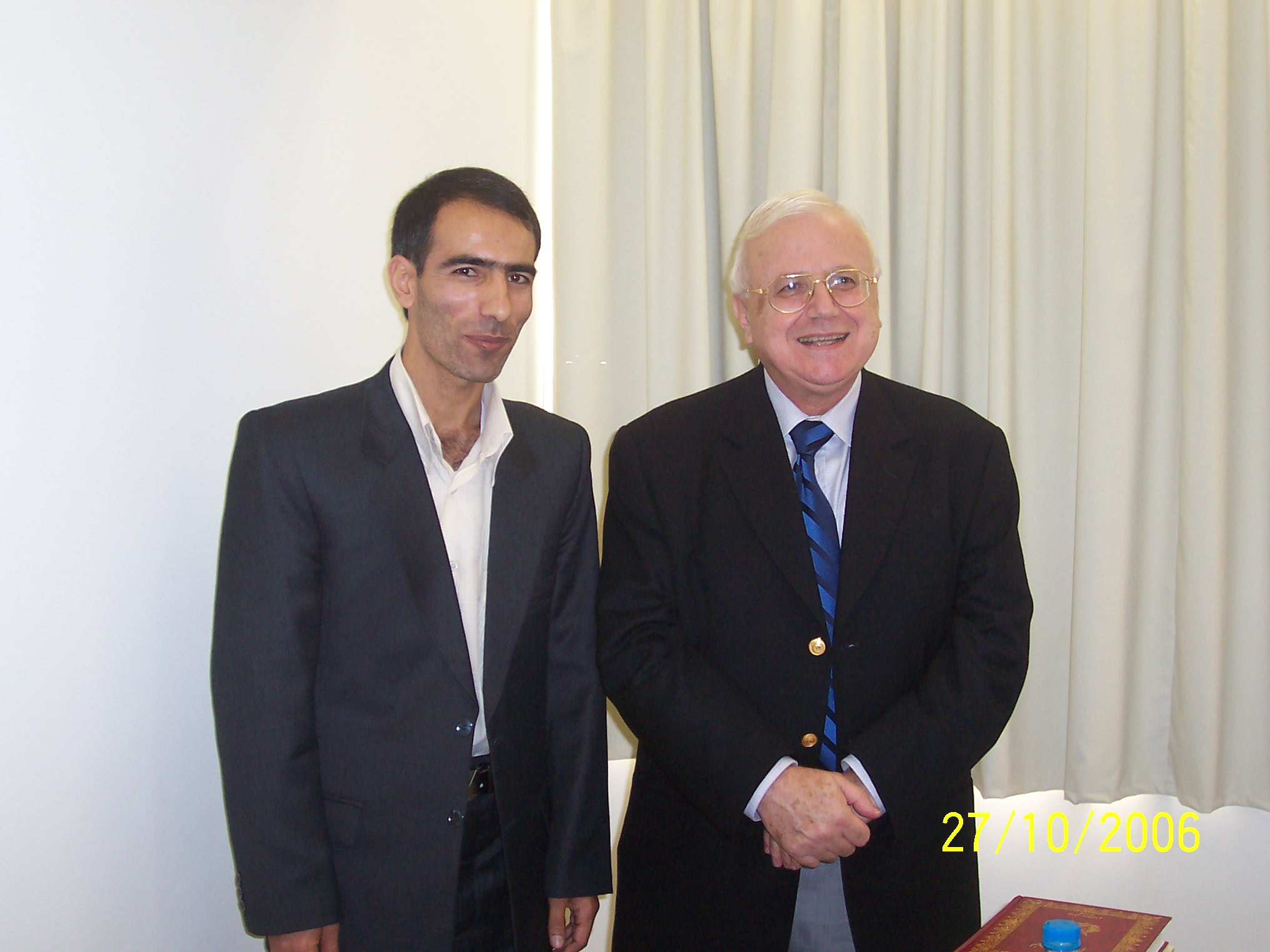 علی‌اصغر قهرمانی مقبل و اهیف سنو در دانشگاه قدیس یوسف (بیروت)